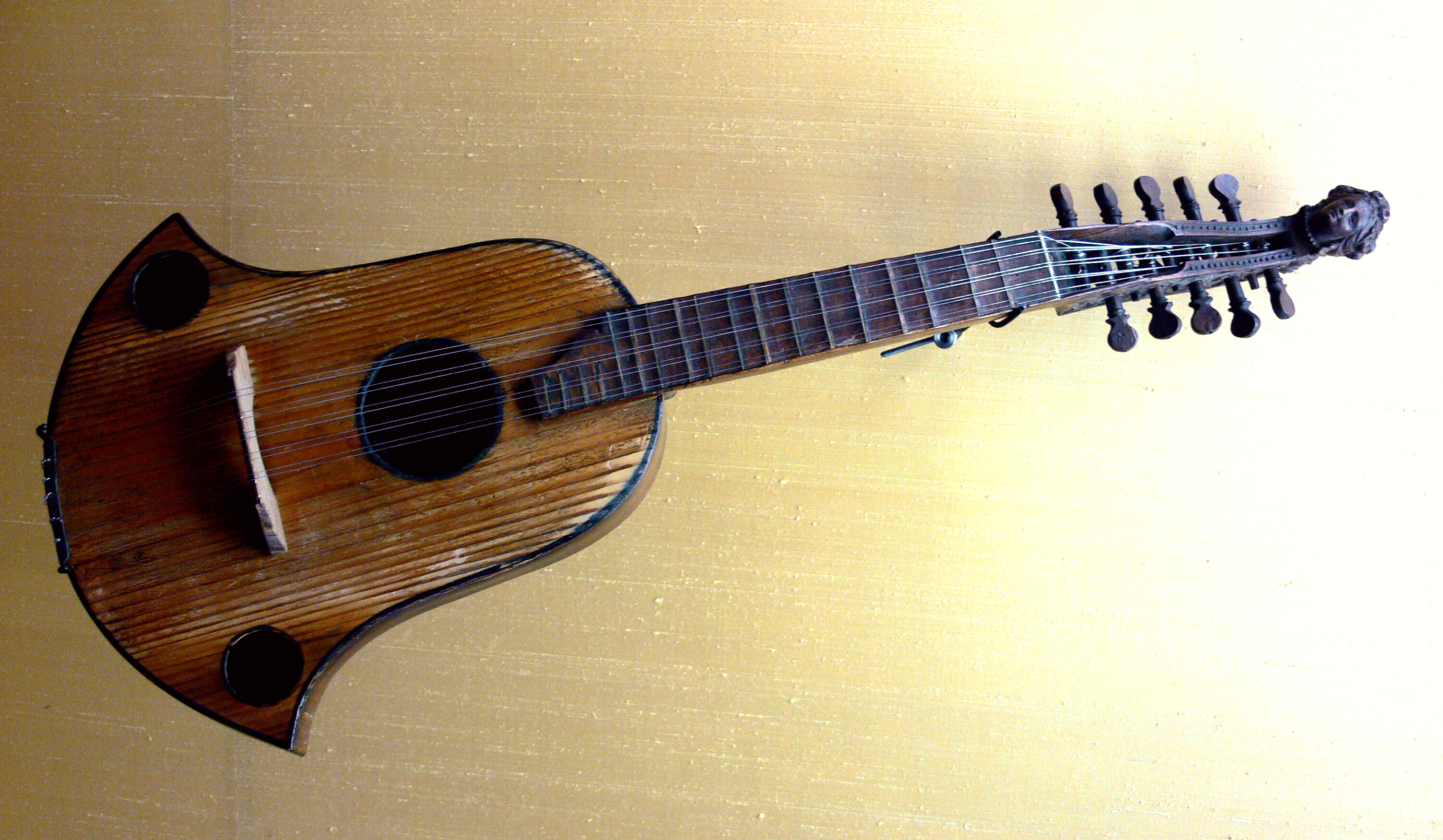 Hamburger Cithrinchen (Cister), Hinrich Kopp, Hamburg 1686 Fichte, Palisander, Bein (Decke im 2. Weltkrieg beschädigt) Bayerisches Nationalmuseum, München, Inv. Nr. Mu 13